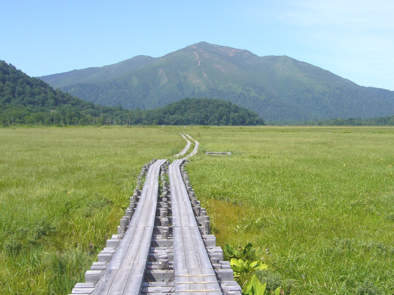 群馬県利根郡片品村にある尾瀬の尾瀬ヶ原を構成する湿原のひとつ中田代湿原と至仏山。麓に見えるの山が突き出している部分は「牛首」と呼ばれるところ。木道が延々と伸びている。